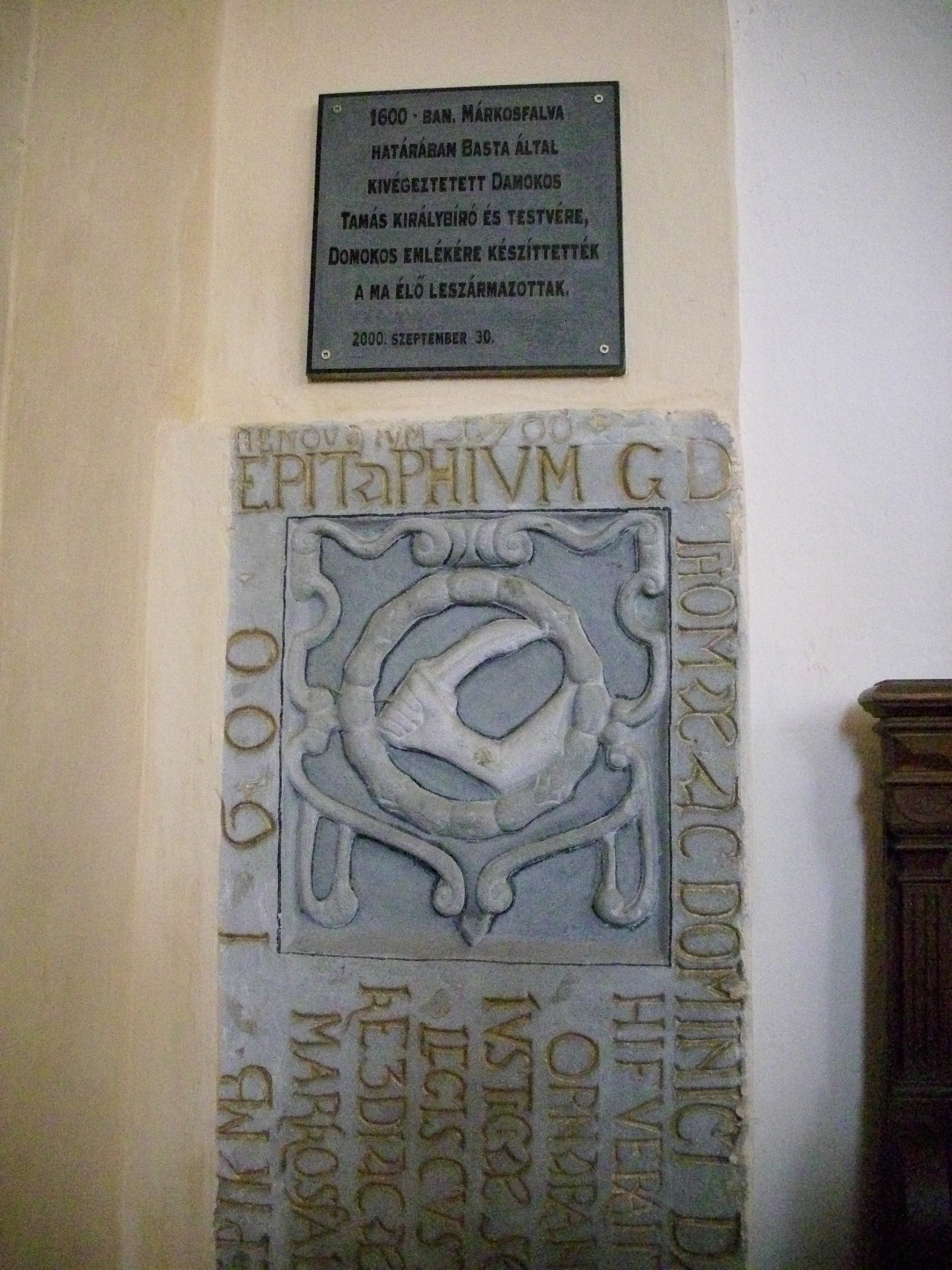 Este o piatra funerară la bisericul cernat. 04